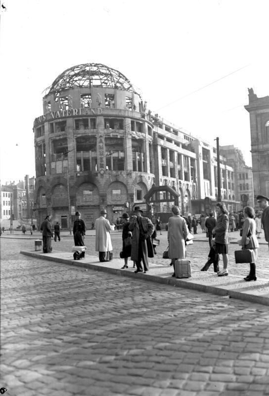 Berlin, Potsdamer Platz, Ruine "Haus Vaterland" ADN-ZB/Bittner, Berlin Das im II. Weltkrieg zerstörte Restaurant "Haus Vaterland" am Potsdamer Platz (Westberlin). Aufn. Oktober 1947 910-47